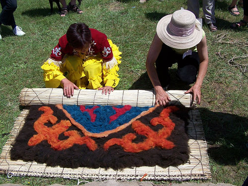 Ala kiyiz yapımı